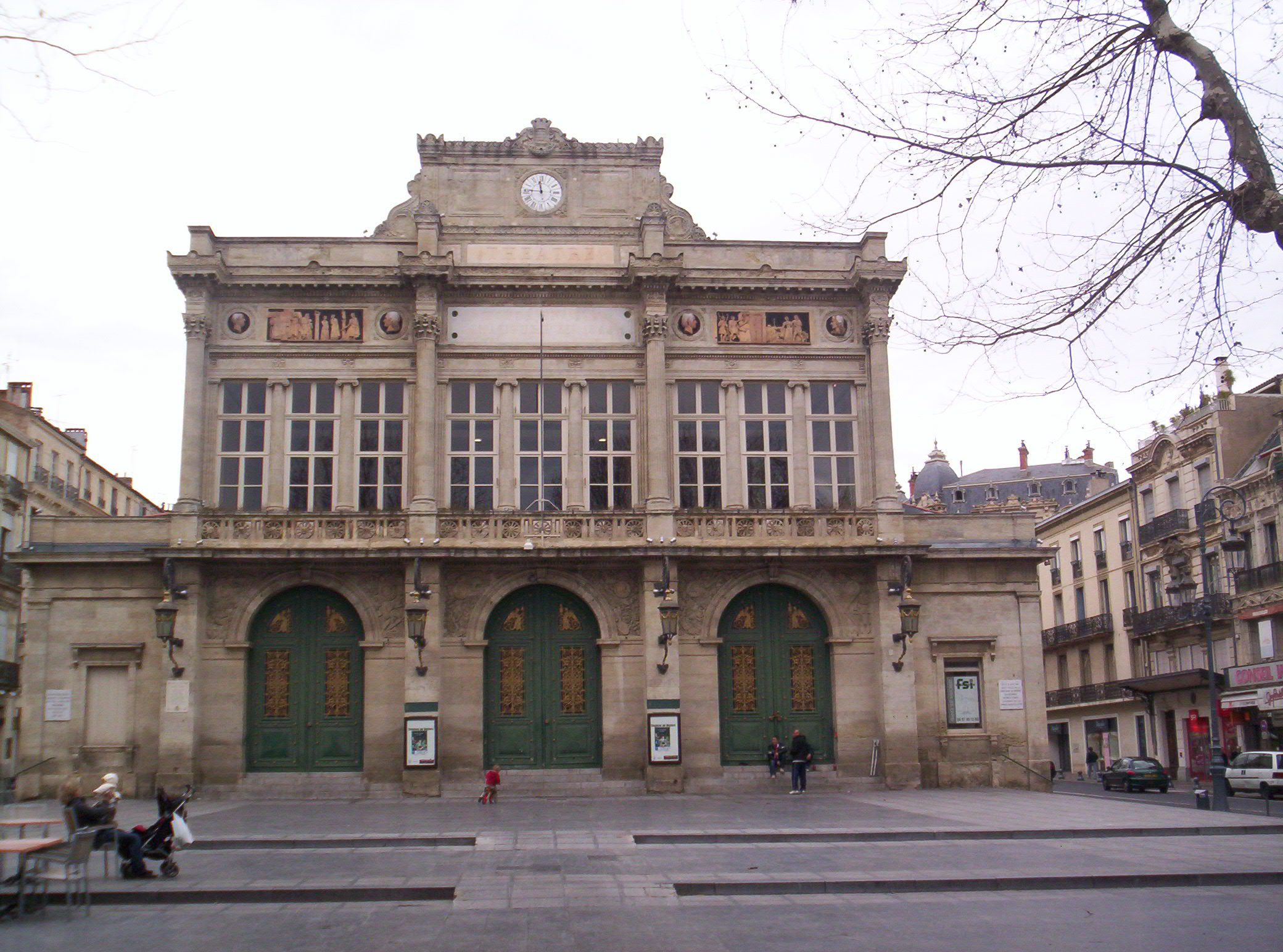 Vue de la façade du théâtre de Béziers (Hérault)